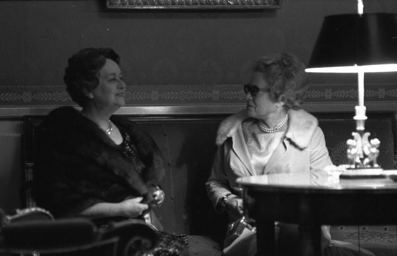 Einweihung der deutschen Botschaftsresidenz, Palais Beauharnais, in Paris: Empfang für Staatspräsident de Gaulle mit Bundespräsident Lübke.